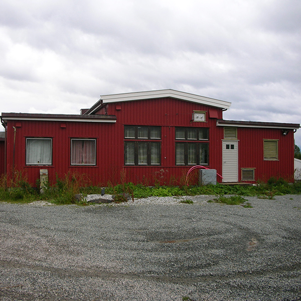 Telemuseets samling i Tromsø ligger i det vernede huset til Langnes Kringkaster.